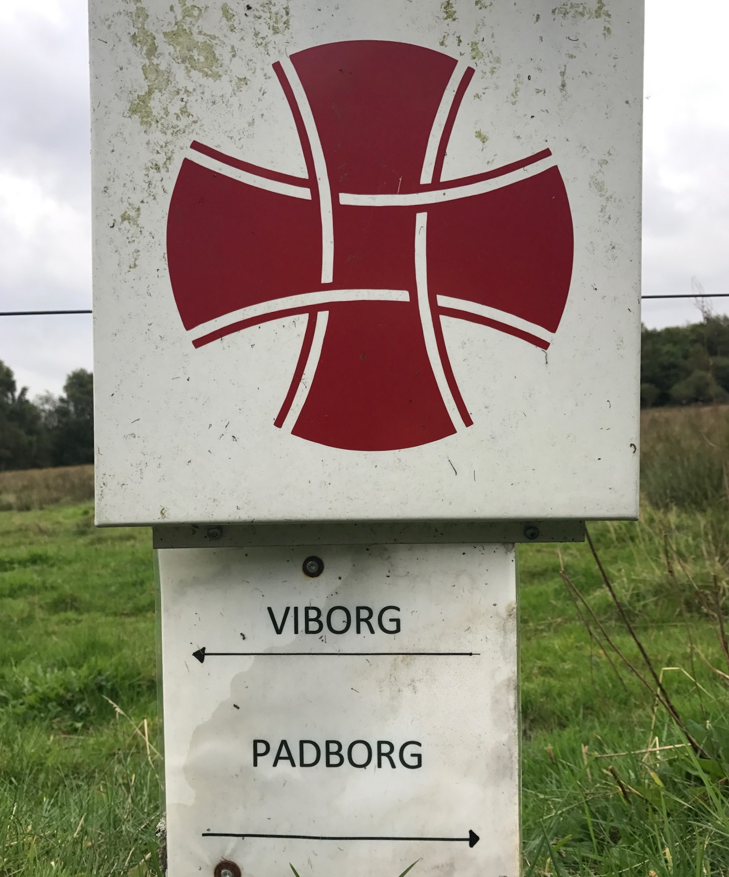 Cartel indicador de albergue en el Hærvejen (Dinamarca)